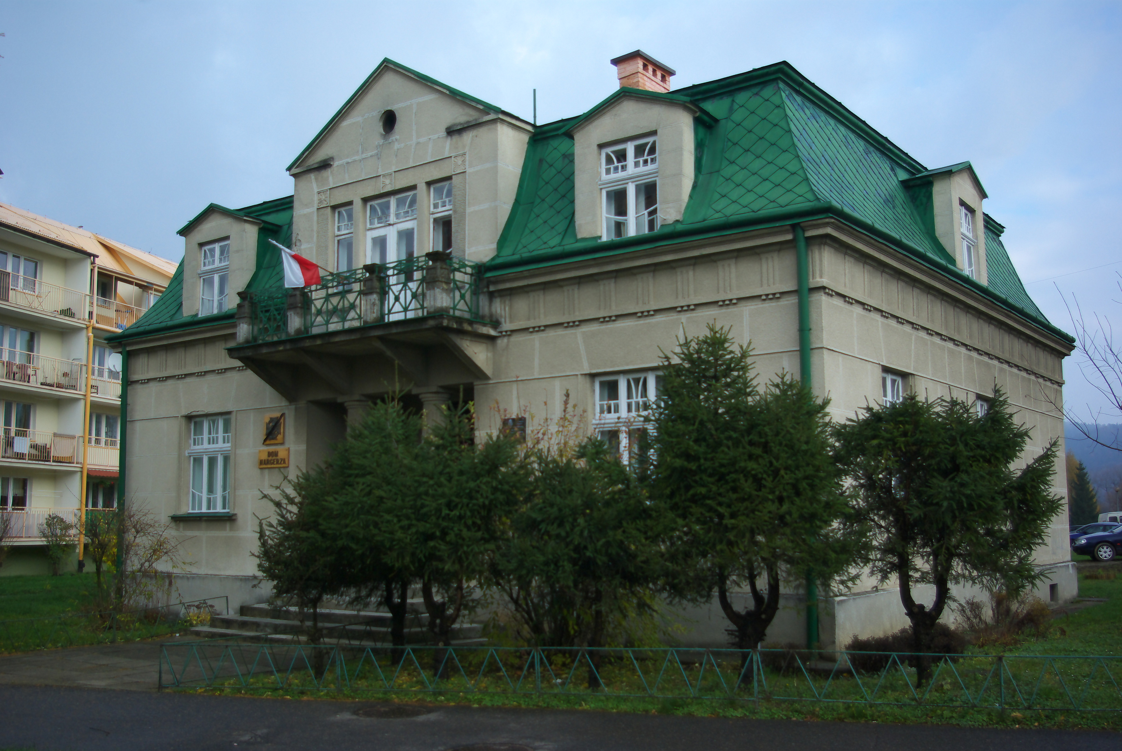 Willa Pod Topolami przy ul. Zielonej 39 w Sanoku. Dom Harcerza, siedziba komendy ZHP w Sanoku.